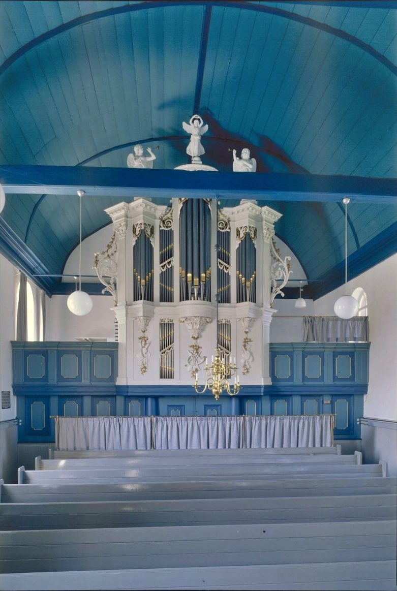 Nederlands Hervormde Kerk: Interieur, aanzicht orgel, orgelnummer 1151 (opmerking: Gefotografeerd voor Het Historische Orgel in Nederland 1790-1818)